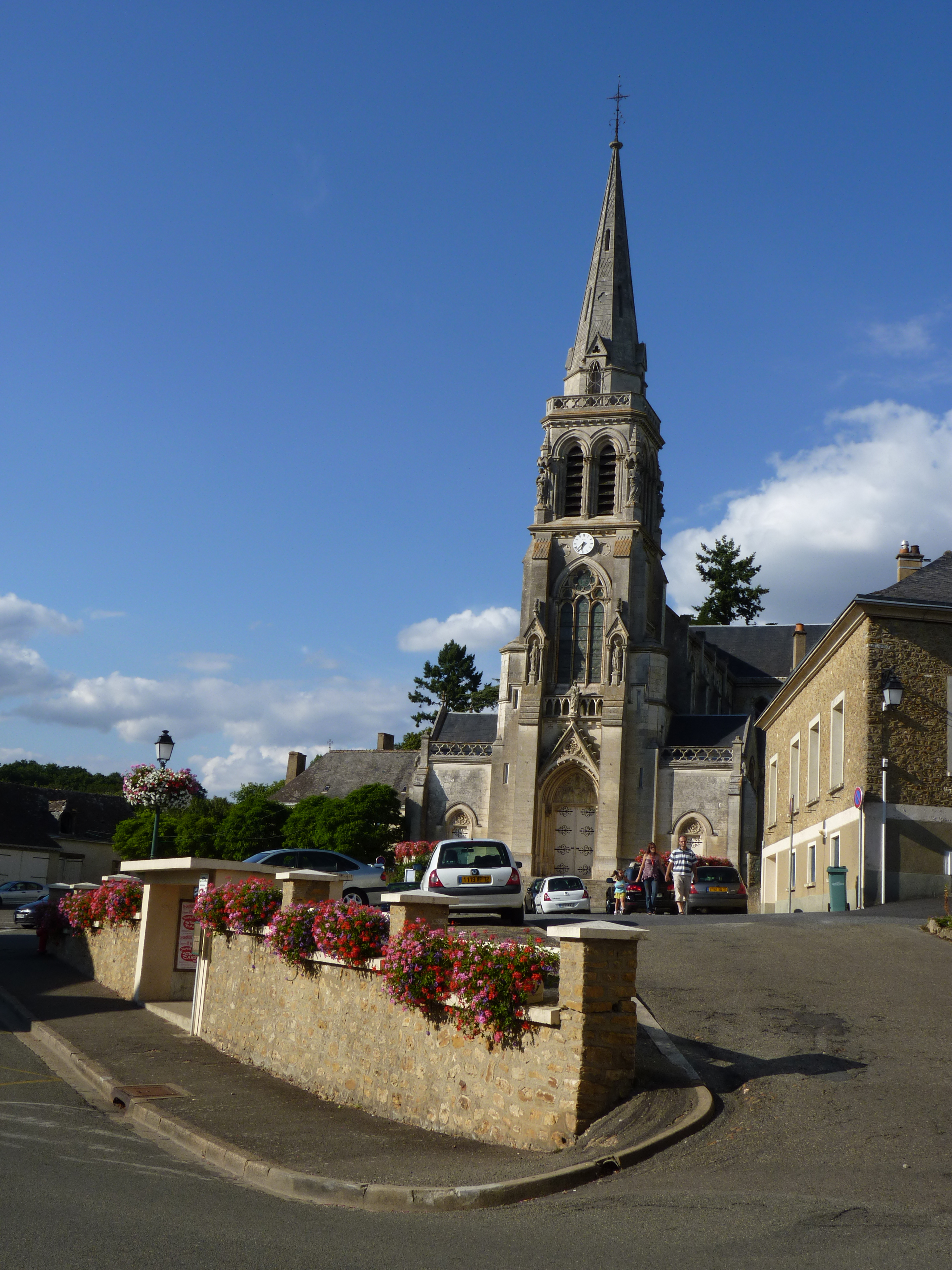 Montfort-le-Gesnois - Eglise Notre Dame